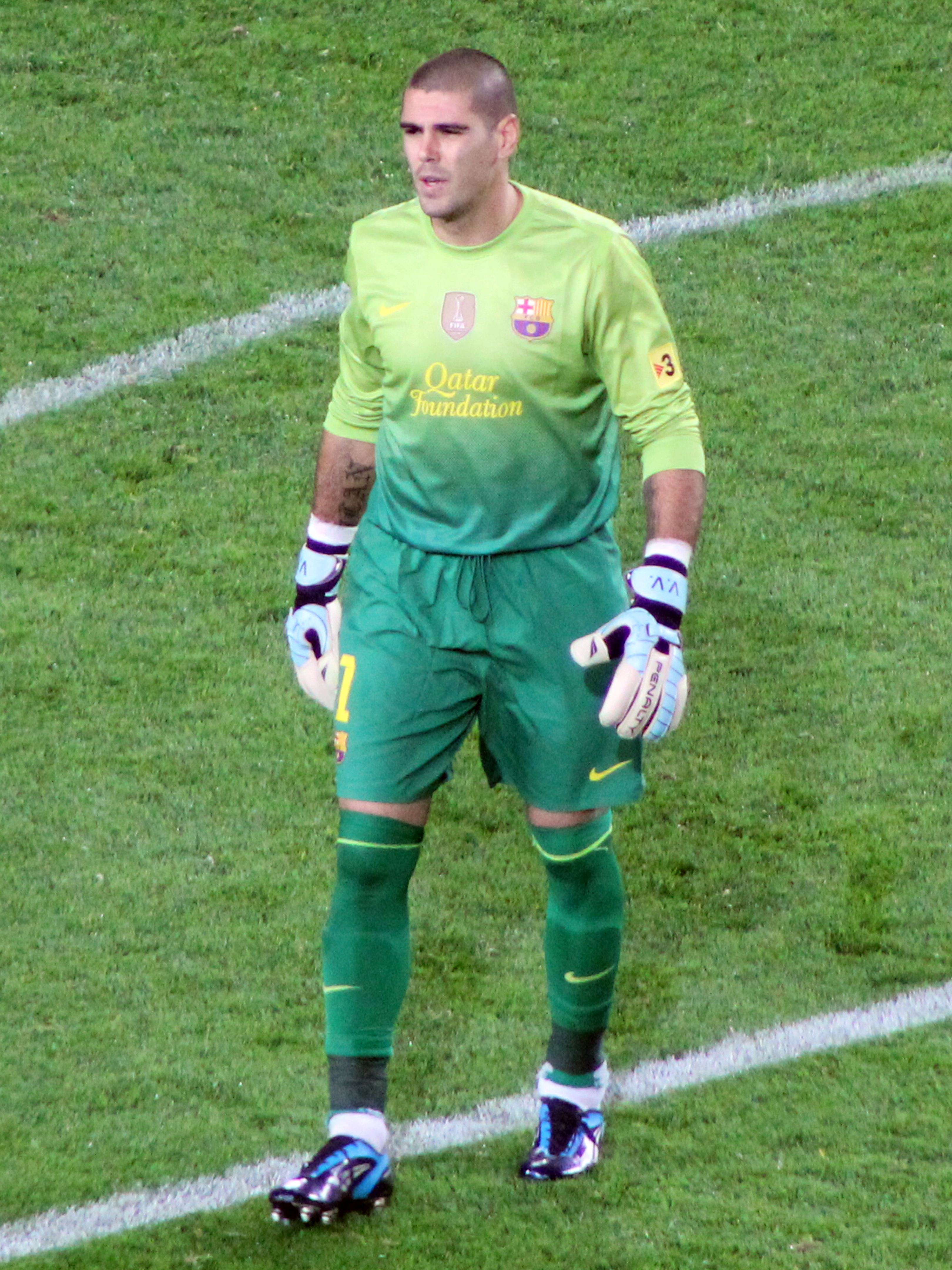 Foto realizada por Javier Segura (@castroquini en Twitter)